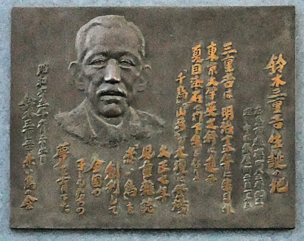 鈴木三重吉の生誕の地